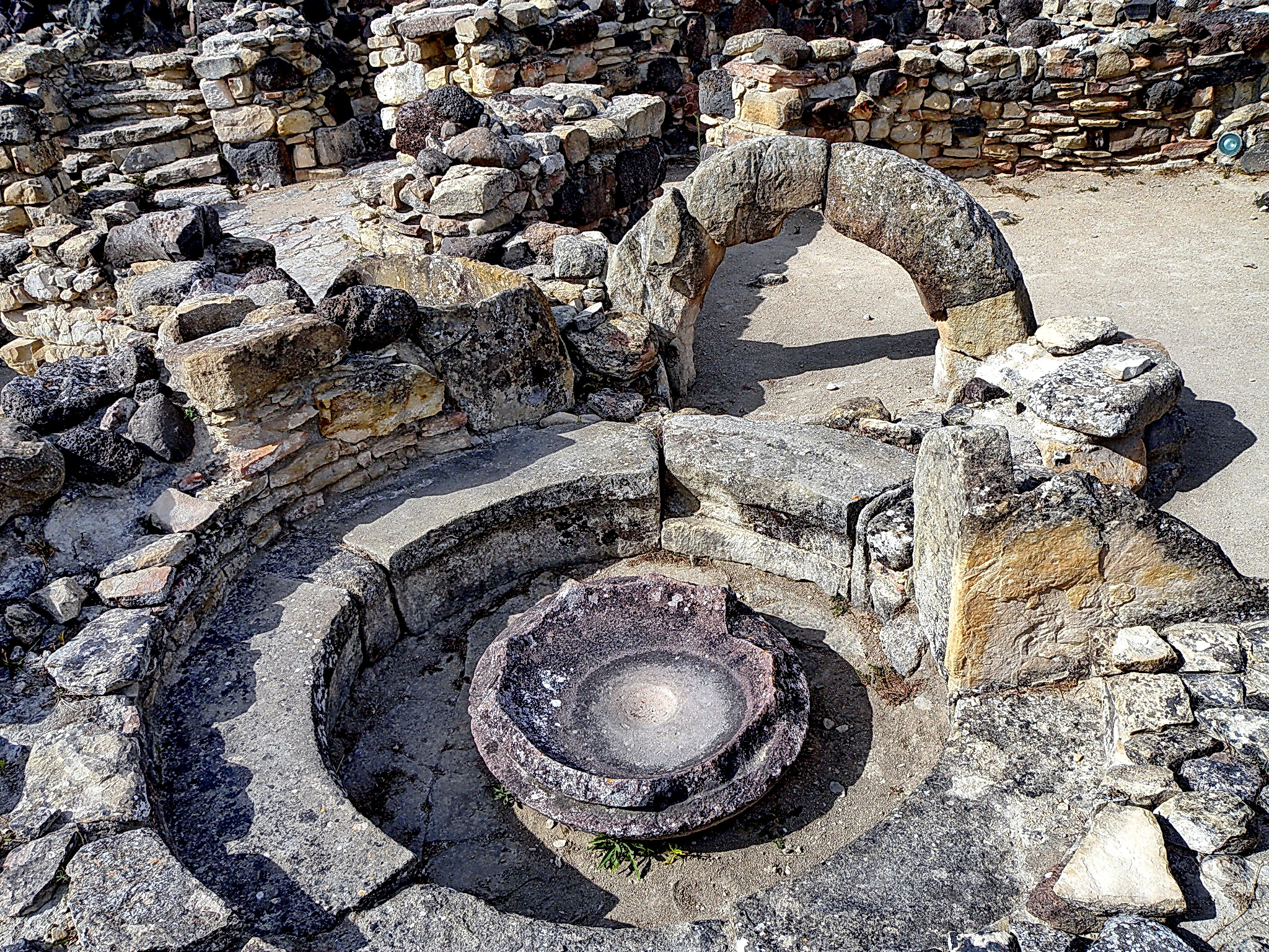 Cabane ou 'Pineta' nuraghique et sa vasque cultuelle